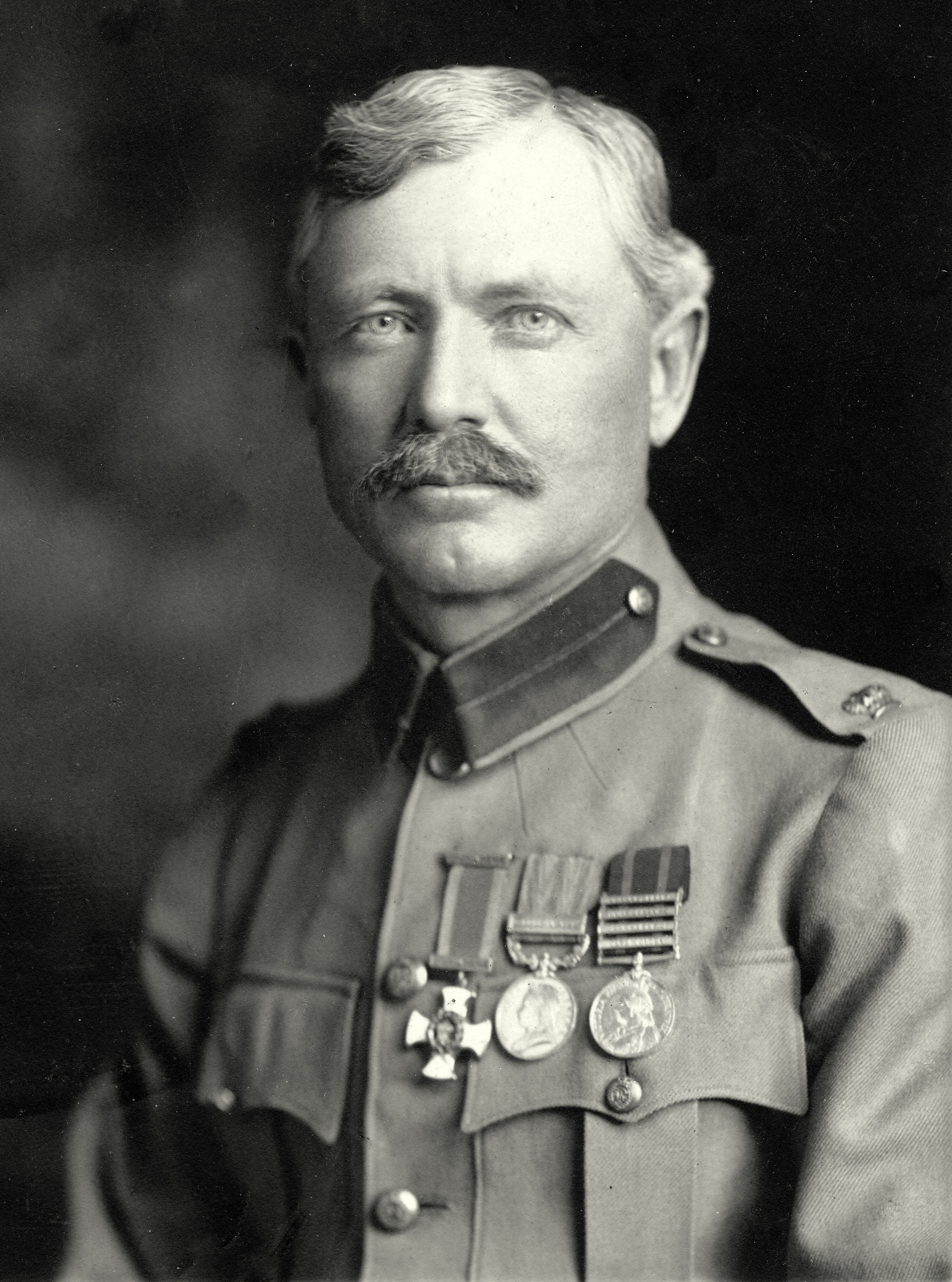 Major Frederick Russell Burnham, DSO